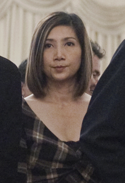 คุณประวิทย์ มาลีนนท์ และทีมงานไทยทีวีสีช่อง3 ร่วมงานไทยสามัคคี ไทยเข้มแข็ง นายกรัฐมนตรี เป็นประธานเปิดโครงการและขอความร่วมมือหน่วยงานภาครัฐและเอกชนในการดำเนิน โครงการ "ไทยสามัคคี ไทยเข้มแข็ง" ระหว่างหน้าตึกสันติไมตรี และตึกไทยคู่ฟ้า ทำเนียบรัฐบาล 18กันยายน2552 (The Official Site of The Prime Minister of Thailand Photo by พีรพัฒน์ วิมลรังครัตน์)